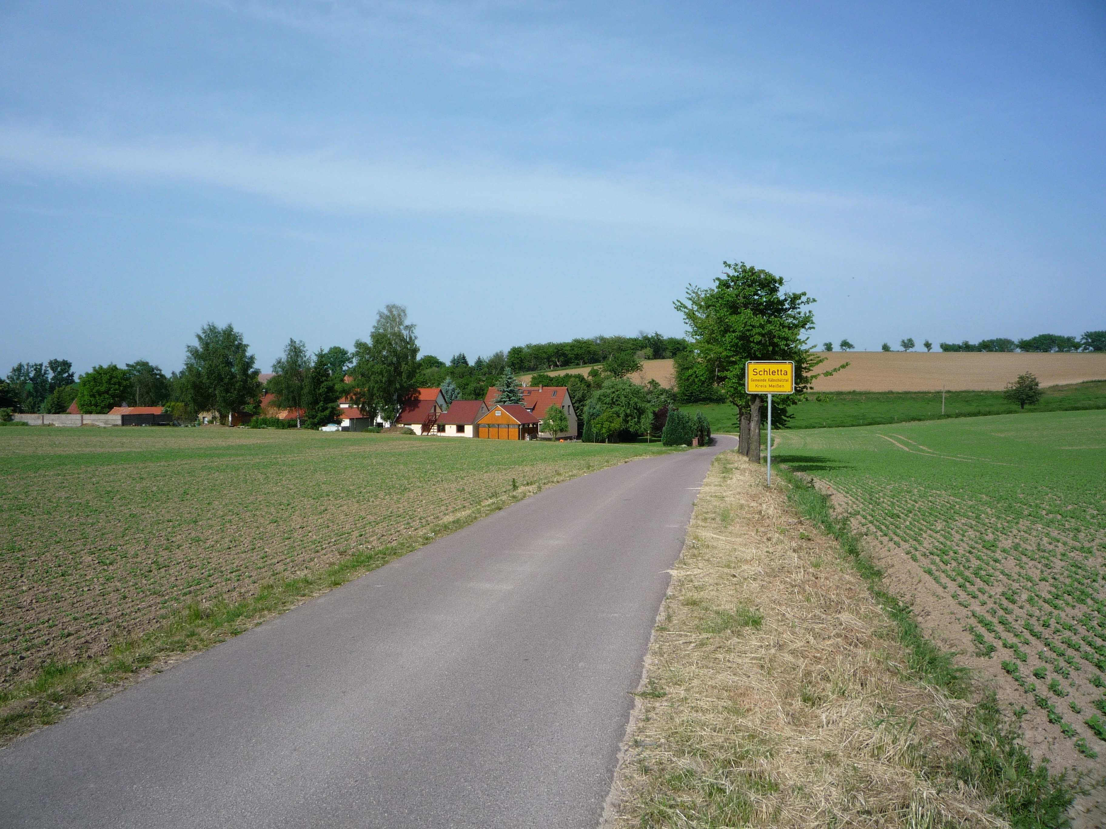 Westliche Zufahrtsstraße nach Schletta, einen Ortsteil der Gemeinde Schletta